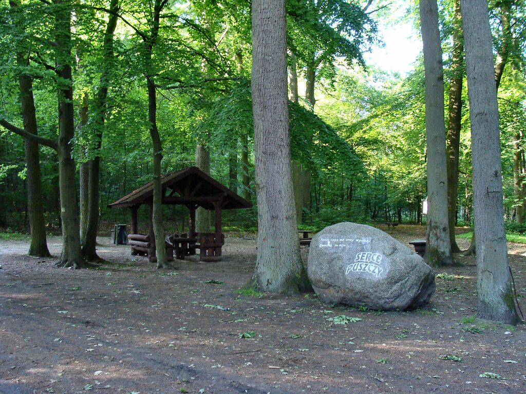 Głaz "Serce Puszczy" w uroczysku "Kołówko" w Puszczy Bukowej pod Szczecinem.